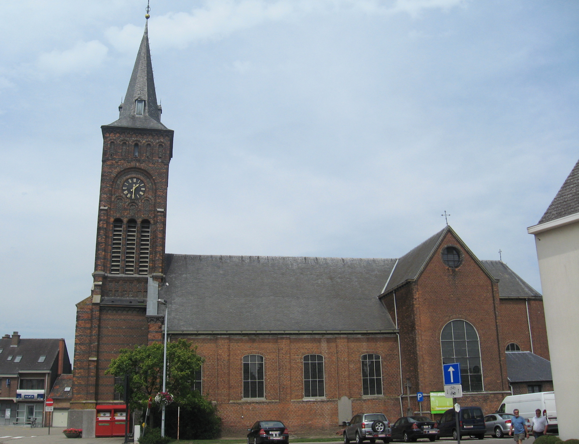 Sint-Jan-de-Doperkerk in Wiekevorst